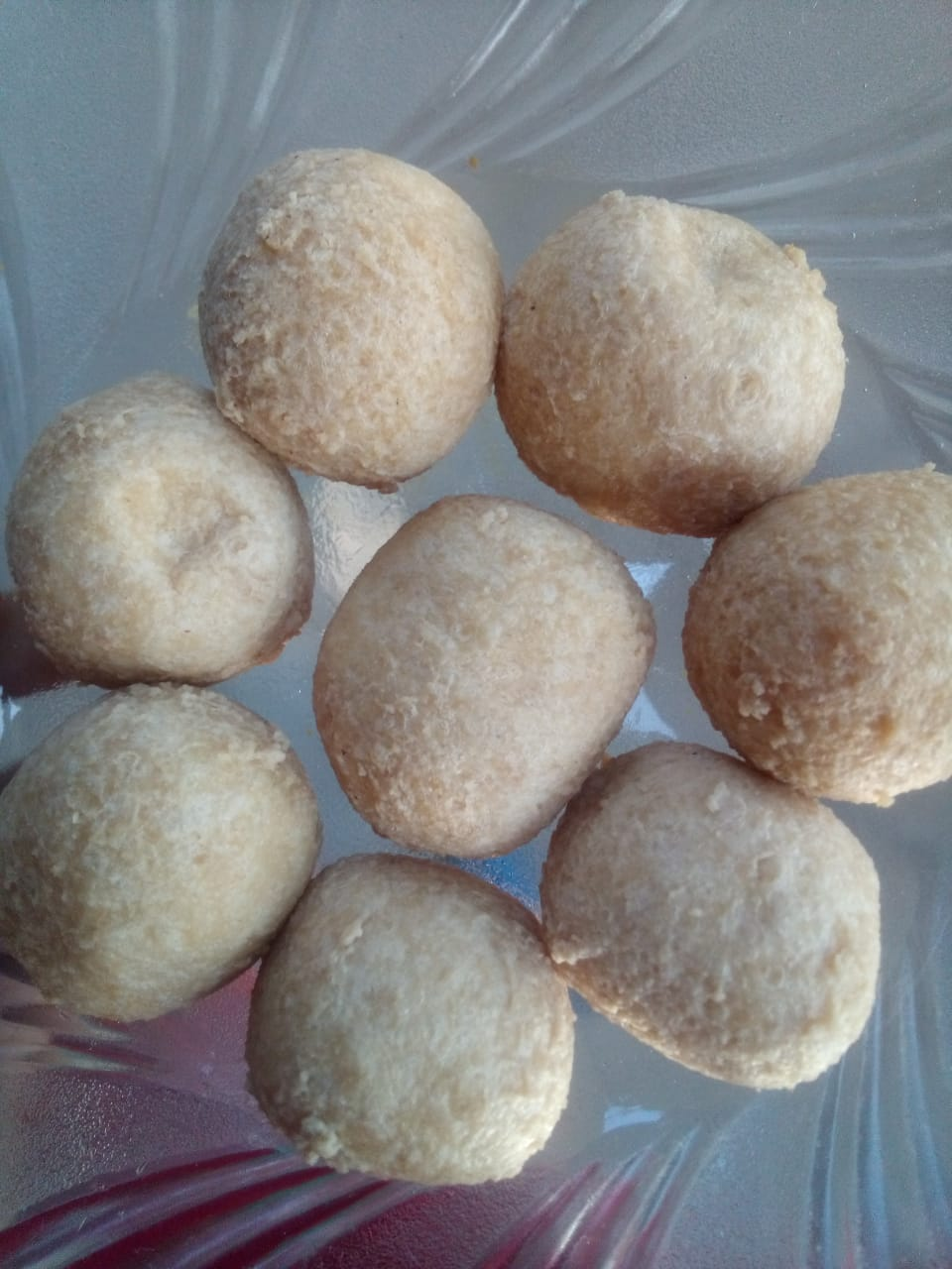 Jawa: Tahu bulat ing piring